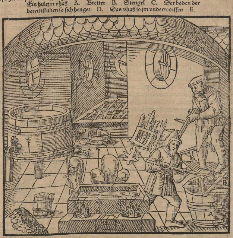 Original image description from the Deutsche Fotothek Bergwerk & Bergbau & Vitriolgewinnung & Vitriol